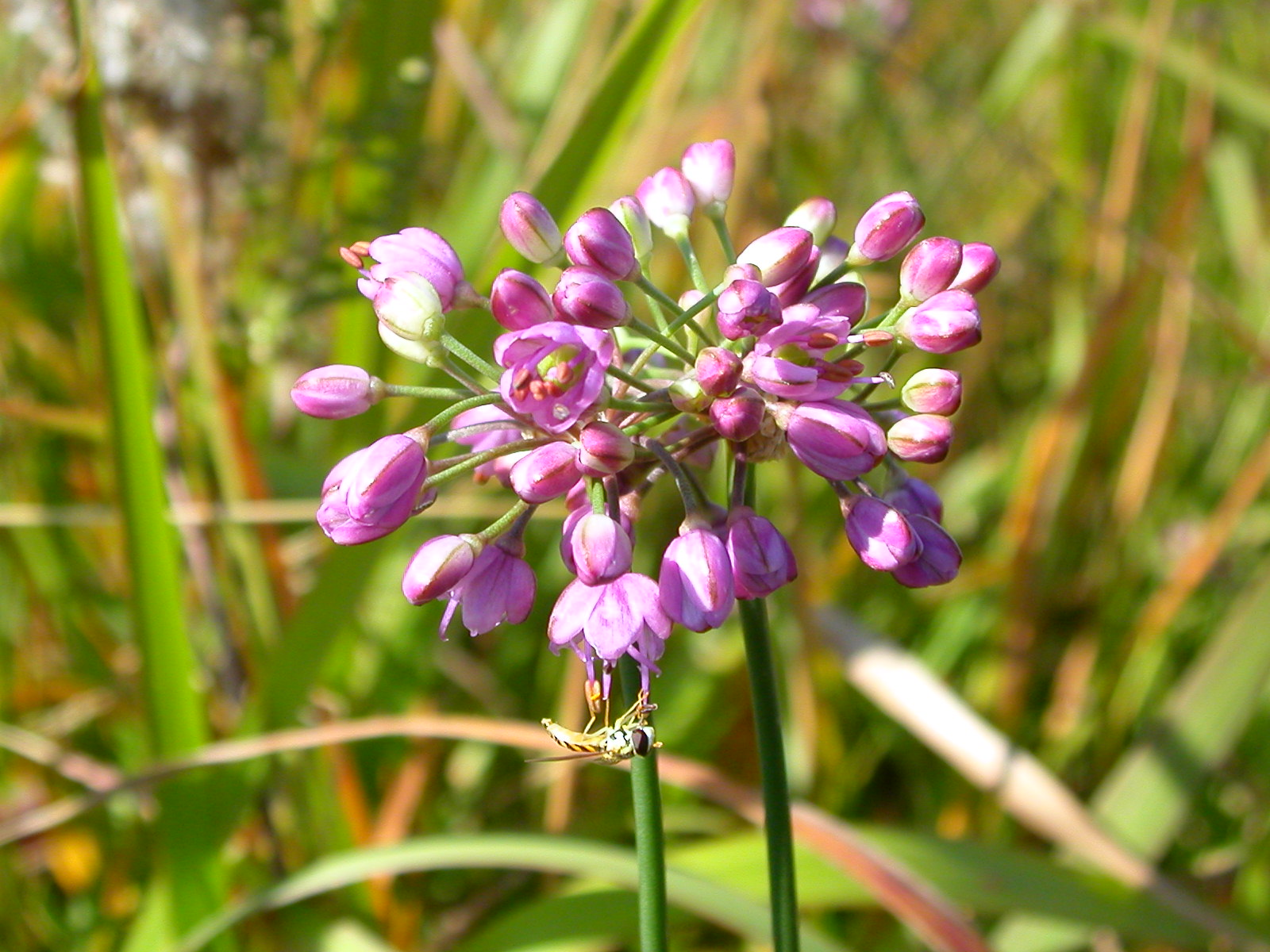 Allium thunbergii.jpg(ヤマラッキョウ)